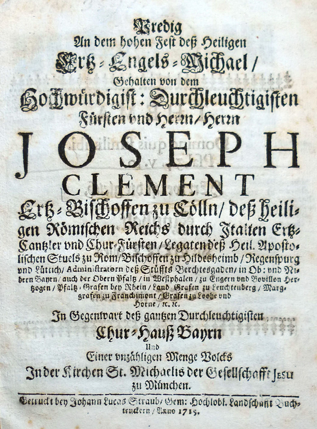 Originaldruck (Titelblatt) einer Predigt des Kurfürsten Joseph Clemens von Köln. Gedruckt bei Johann Lucas Straub im Jahr 1715.